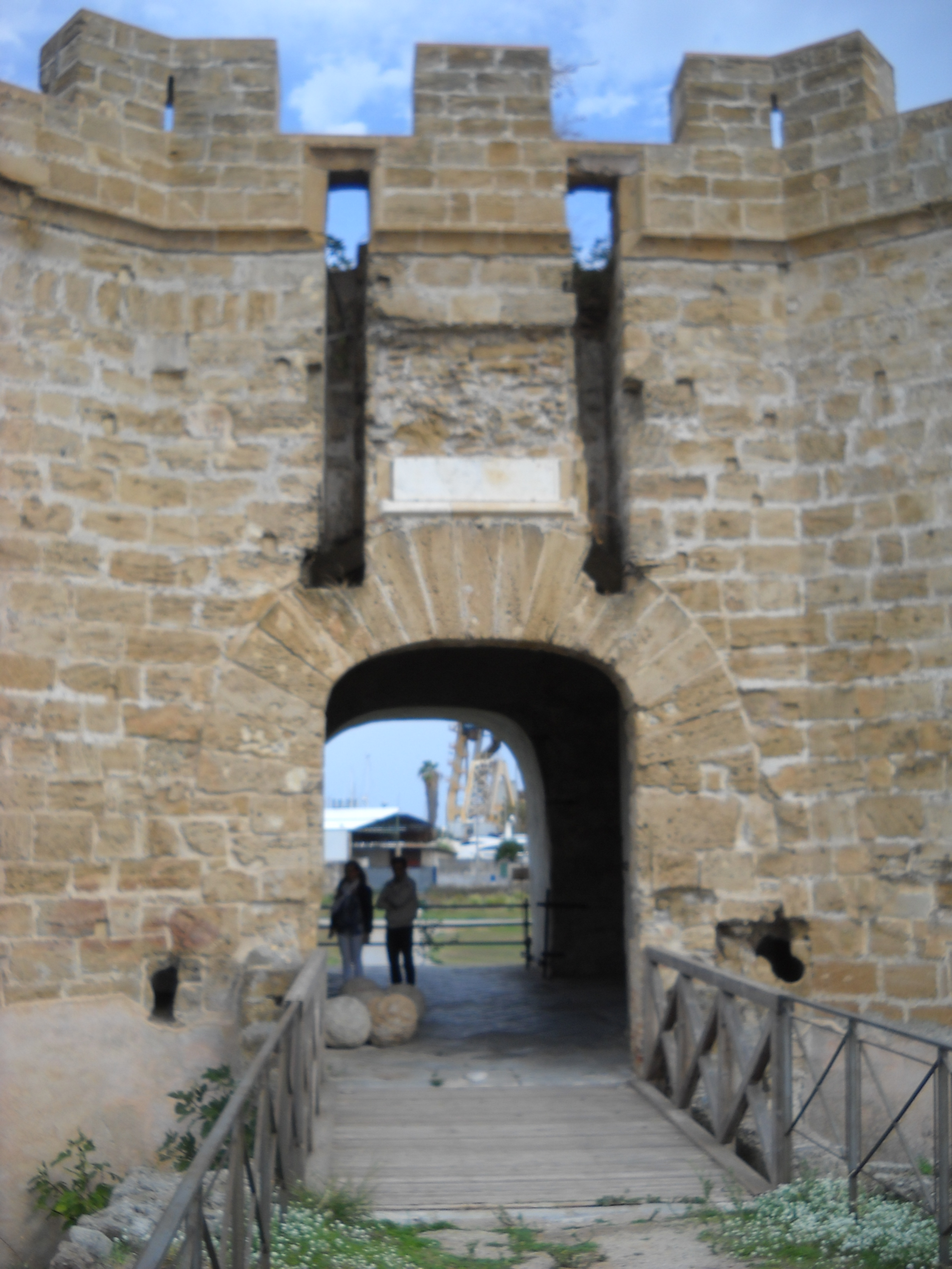 Castello a mare di Palermo ingresso principale